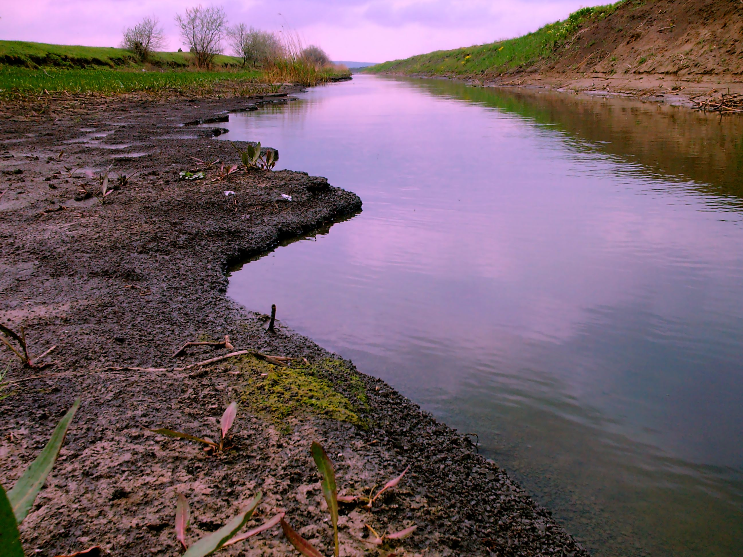 Речка